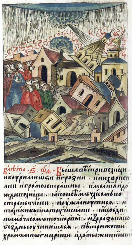 ЛИЦЕВОЙ ЛЕТОПИСНЫЙ СВОД В 6809 году. Были ветры великие и бури многие и грозные, и вихри сильные, и громы страшные, и молнии, и дожди великие, так что (пришлось) всем людям вострепетать и ужаснуться; и настолько были тучи сильные, что за один только час рвы и овраги словно бездны учинились; ветры же с вихрем многие церкви и дома жителей 74 В том же году князь Данило Александрович Московский приходил ратью на Рязань, и бились у города у Переславля. И князь великий Данило Александрович Московский одолел, и много бояр и людей избил, а князя их из основания вырывали, а у некоторых верхи срывали и до половины храмы великие разрушали, и таких не возможно сосчитать.